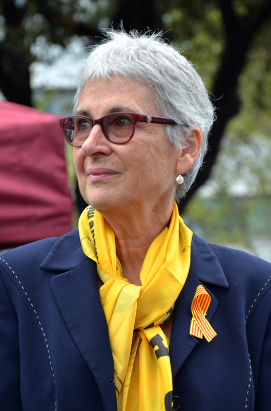 Muriel Casals. La Via Catalana a Barcelona. Plaça Catalunya.